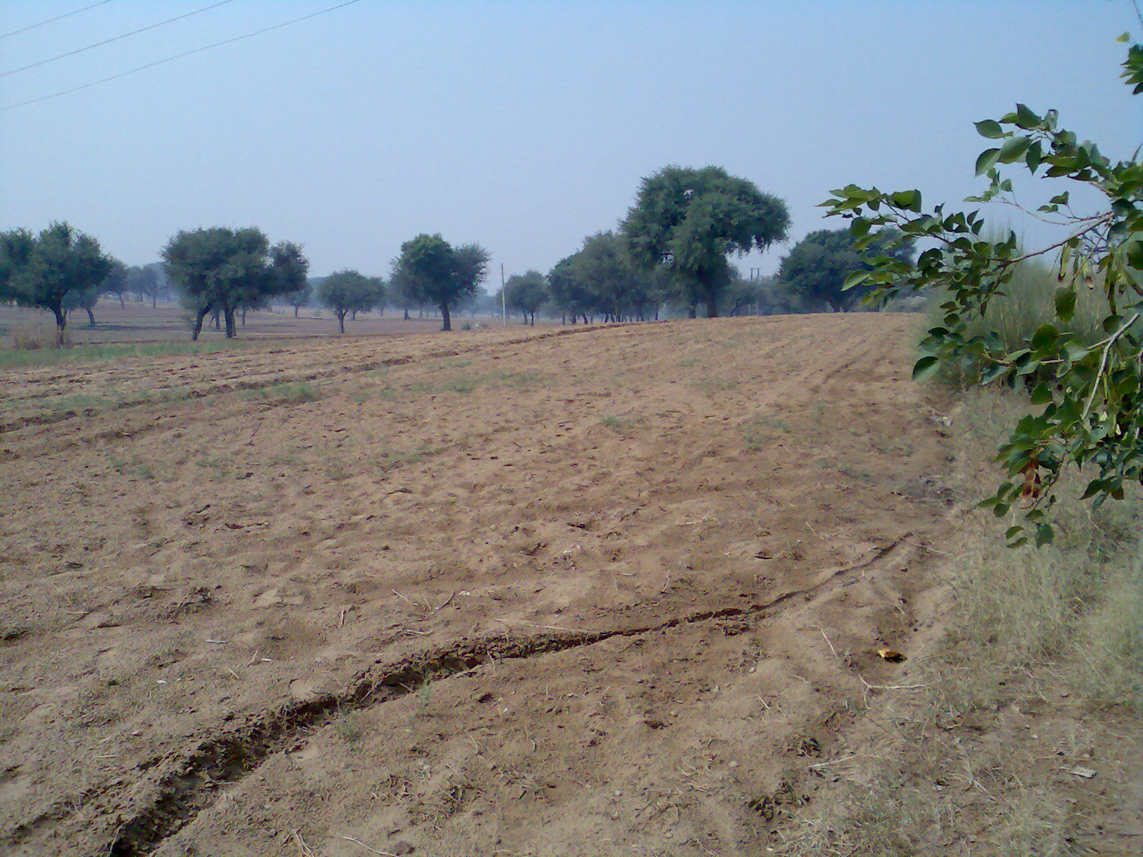 उक्त चित्र चंदेनी ग्राम के खेतों से लिया है है